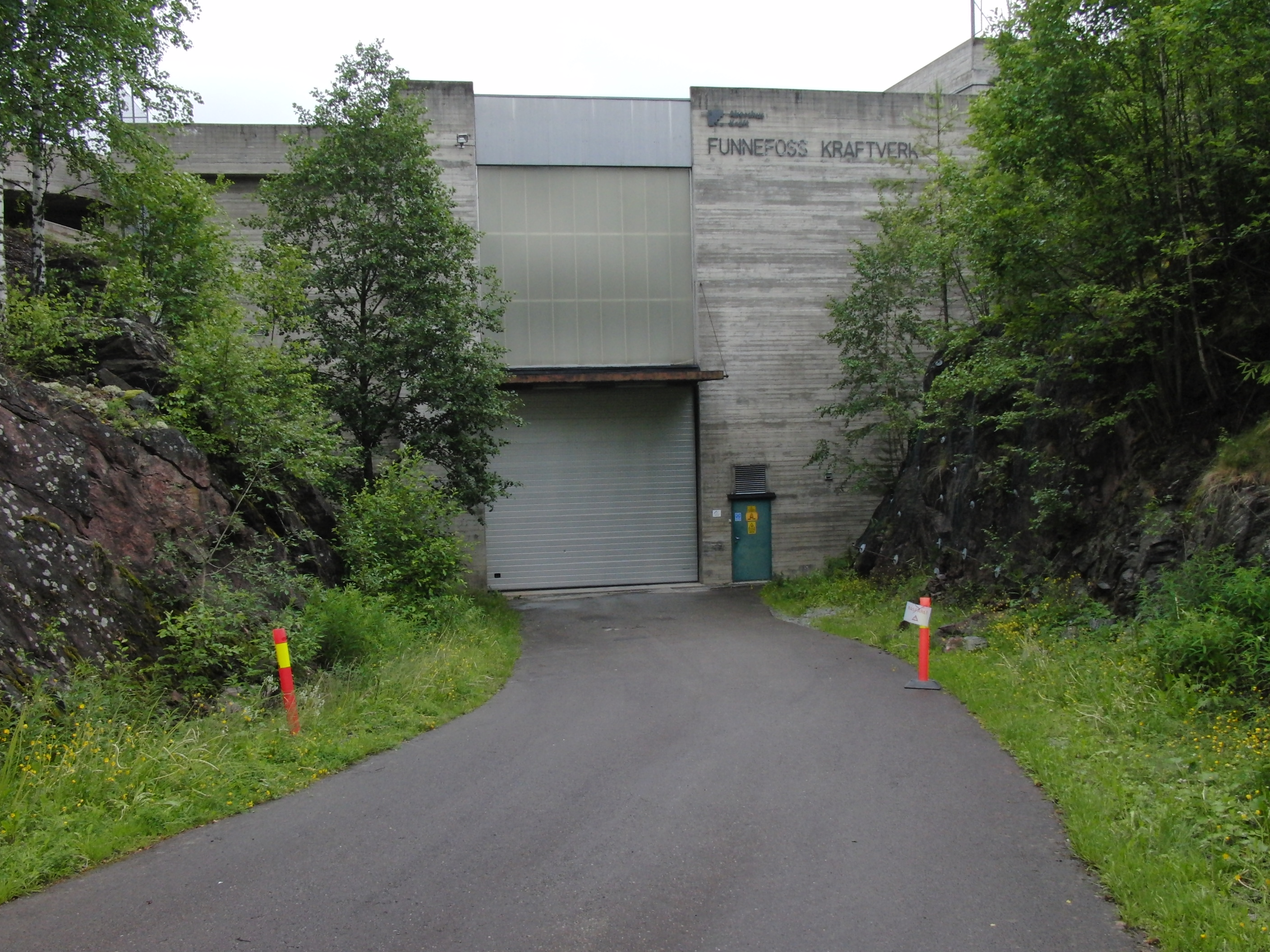 Funnefoss kraftverk